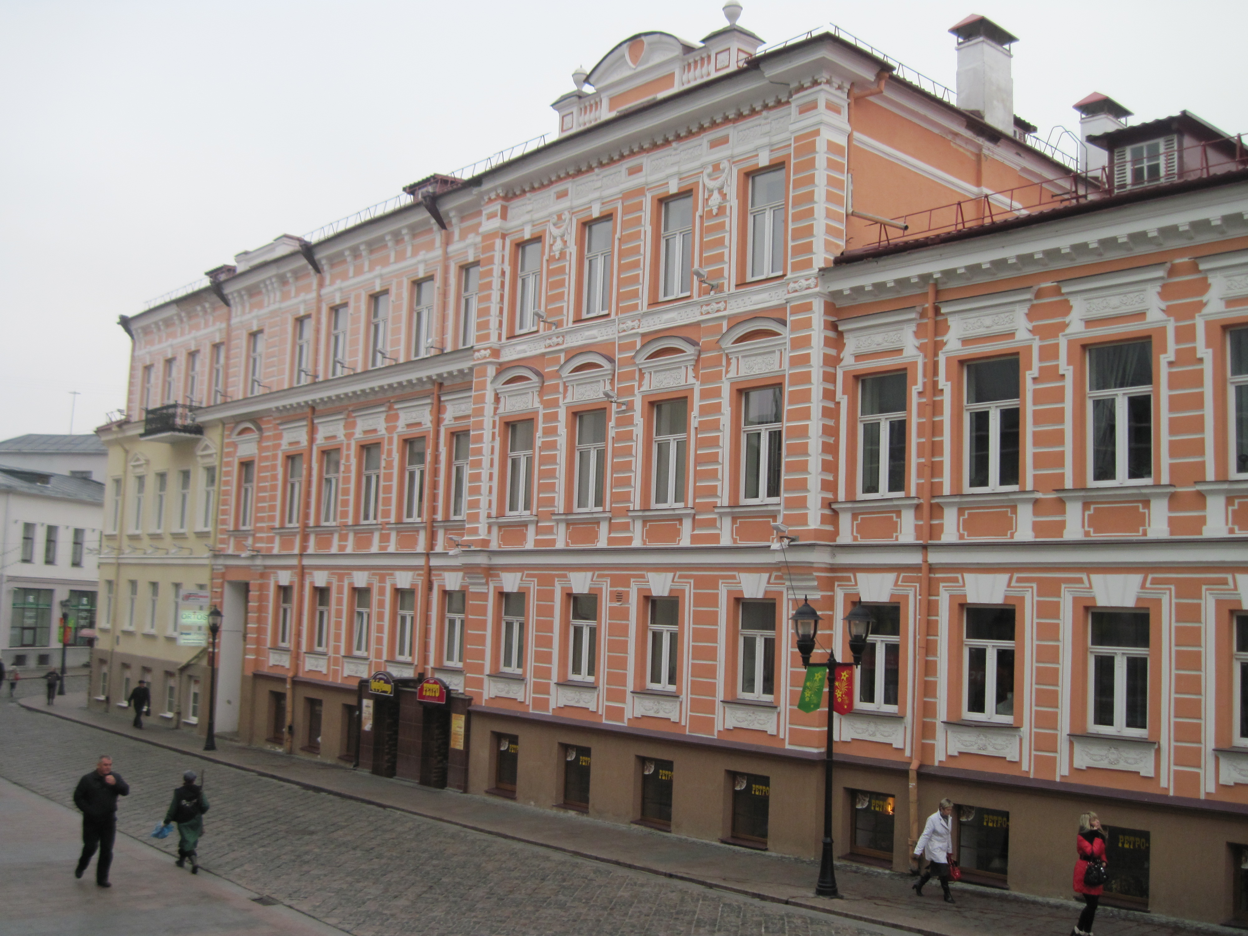 Беларуская (тарашкевіца): Выява дома вул. Савецкая, 31 , г. Гродна